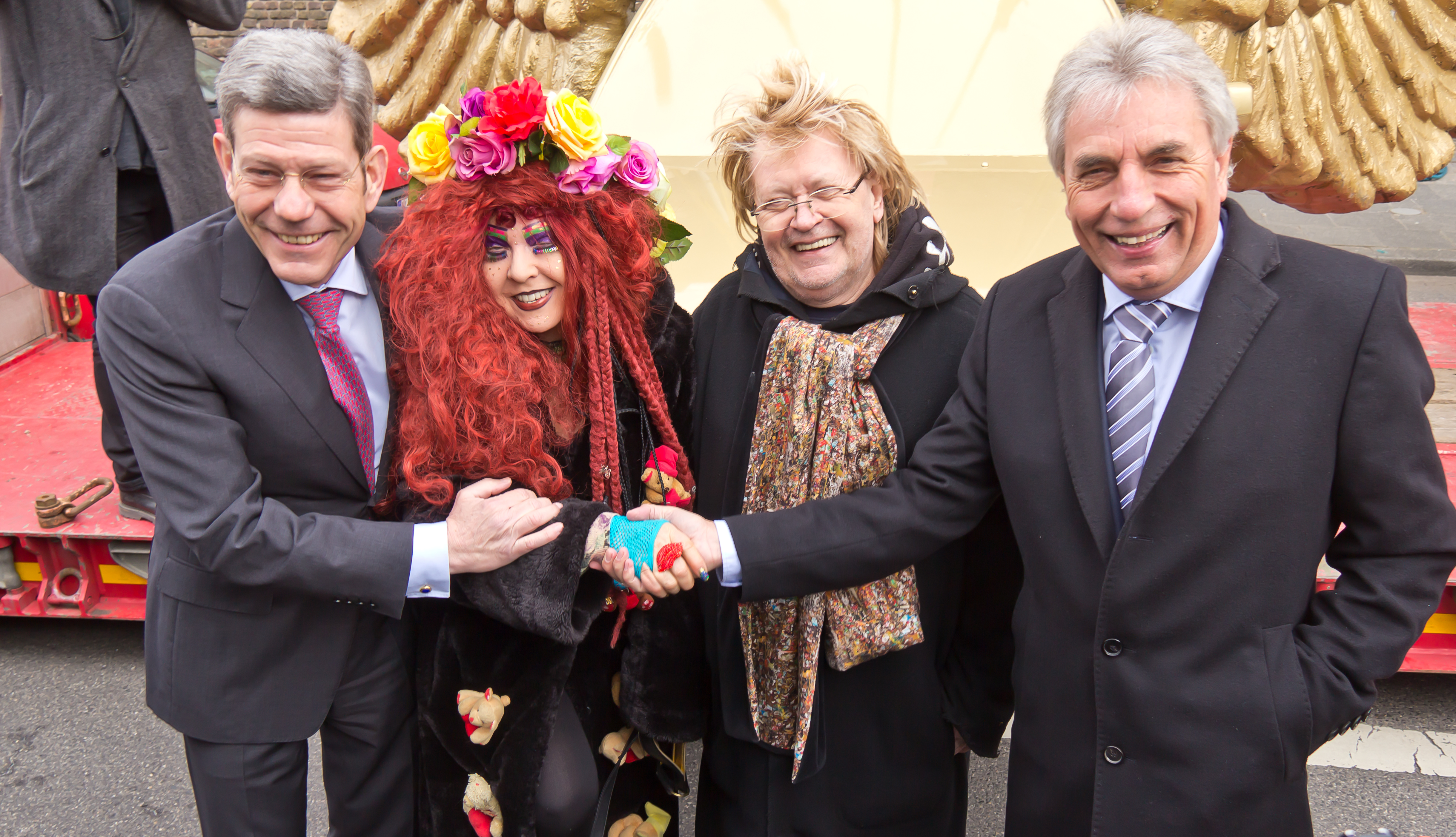 Rückkehr des Flügelautos auf den historischen Treppenturm des Kölnischen Stadtmuseums. Im November 2012 musste das Kunstwerk abgenommen werden, um Mängel an der Betonstandplatte auf dem Turm zu beheben. Auszubildende der Kölner Ford-Werke in Niehl restaurierten zeitgleich das Flügelauto. Bei dieser Generalüberholung lackierten sie den „Vogel“ komplett neu und ersetzten die Haube, die Heckklappe sowie die Radkappen. Foto: Vor dem Flügelauto haben sich zu einem Gruppenbild zusammengefunden: Bernhard Mattes, Vorsitzender der Geschäftsführung der Ford-Werke GmbH Elke Koska, „Muse“ von HA Schult HA Schult, Künstler Jürgen Roters, Oberbürgermeister von Köln